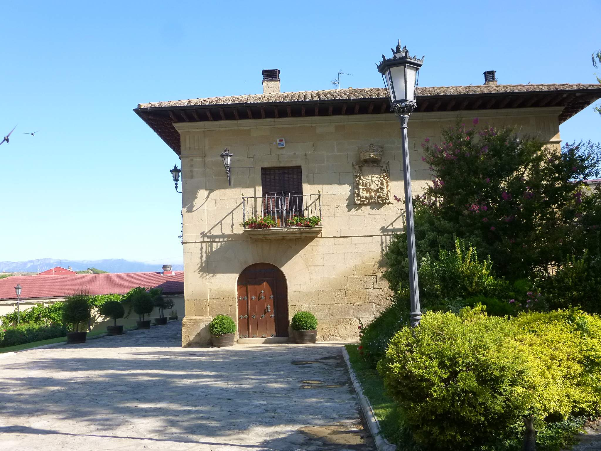 Palacio del Marqués del Puerto (Oyón, Álava)